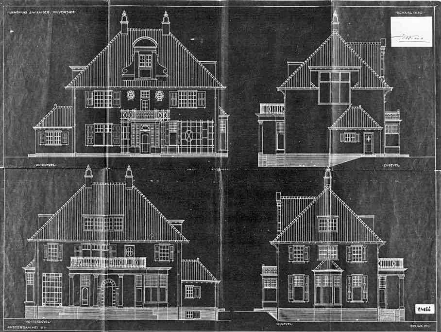 Ontwerp (1911) van Johannes Hendrik Willem (Willem) Leliman (Amsterdam, 26 augustus 1878 - Baarn, 7 april 1921) voor Villa 't Zuidereind, Utrechtseweg 63 te Hilversum.